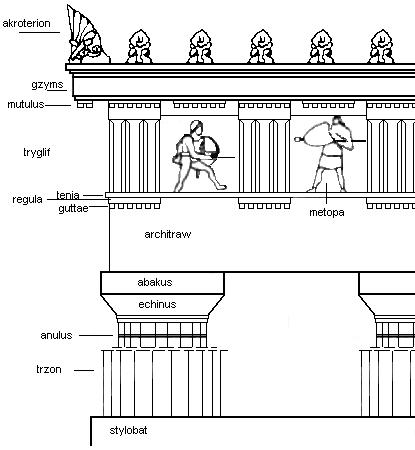 Porządek dorycki (styl) to jeden z najbardziej znanych porządków architektonicznych czasów starożytnych. Charakteryzuje się on ciężkimi proporcjami, surowością i monumentalizmem. Walory artystyczne ustępowały w nim miejsca funkcjonalizmowi. Autor rys. Radomil